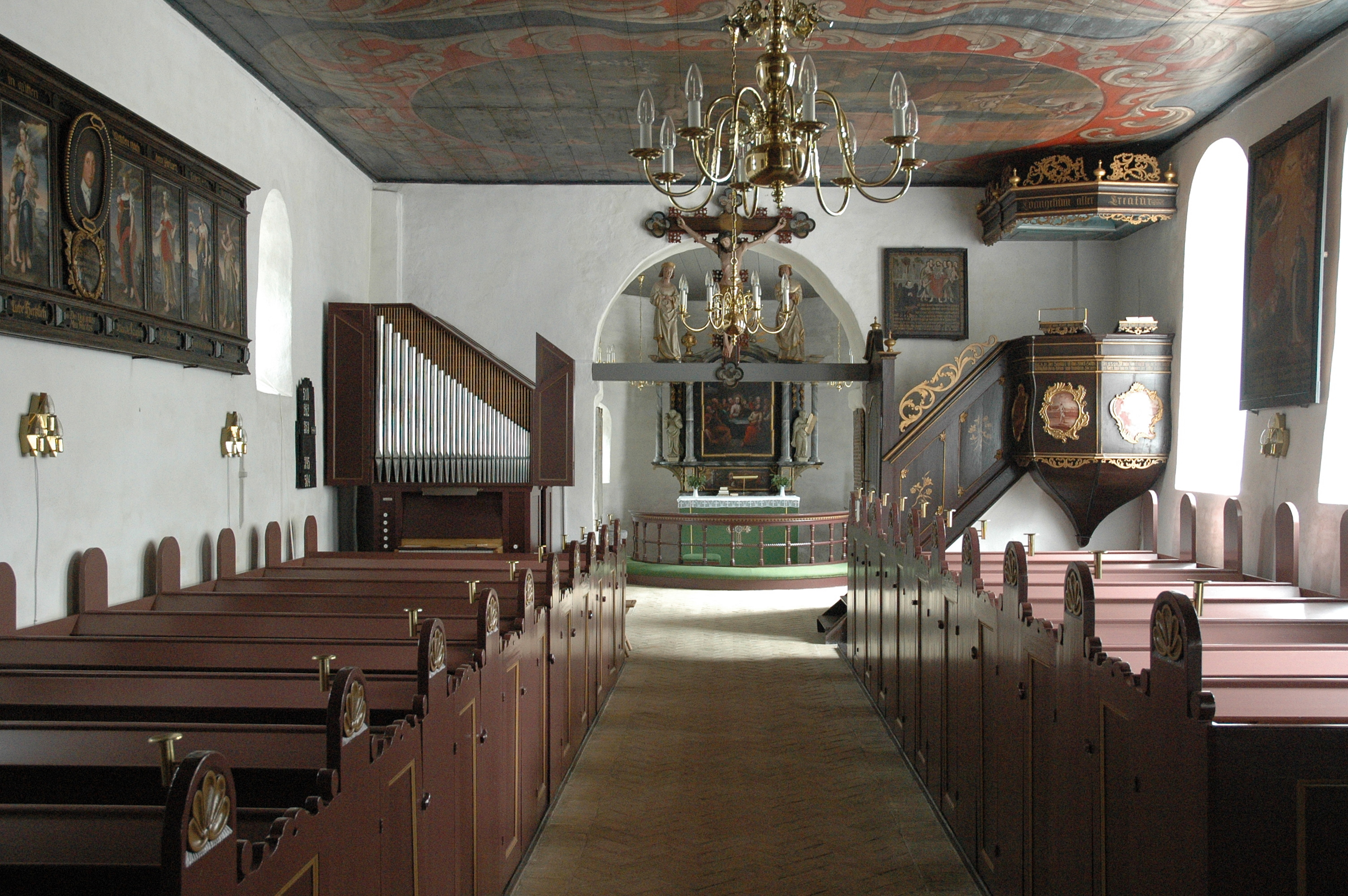 Ubjerg Kirke